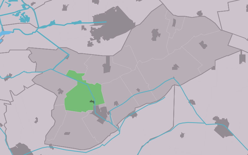 Kaartsje fan himrik fan Terwispel